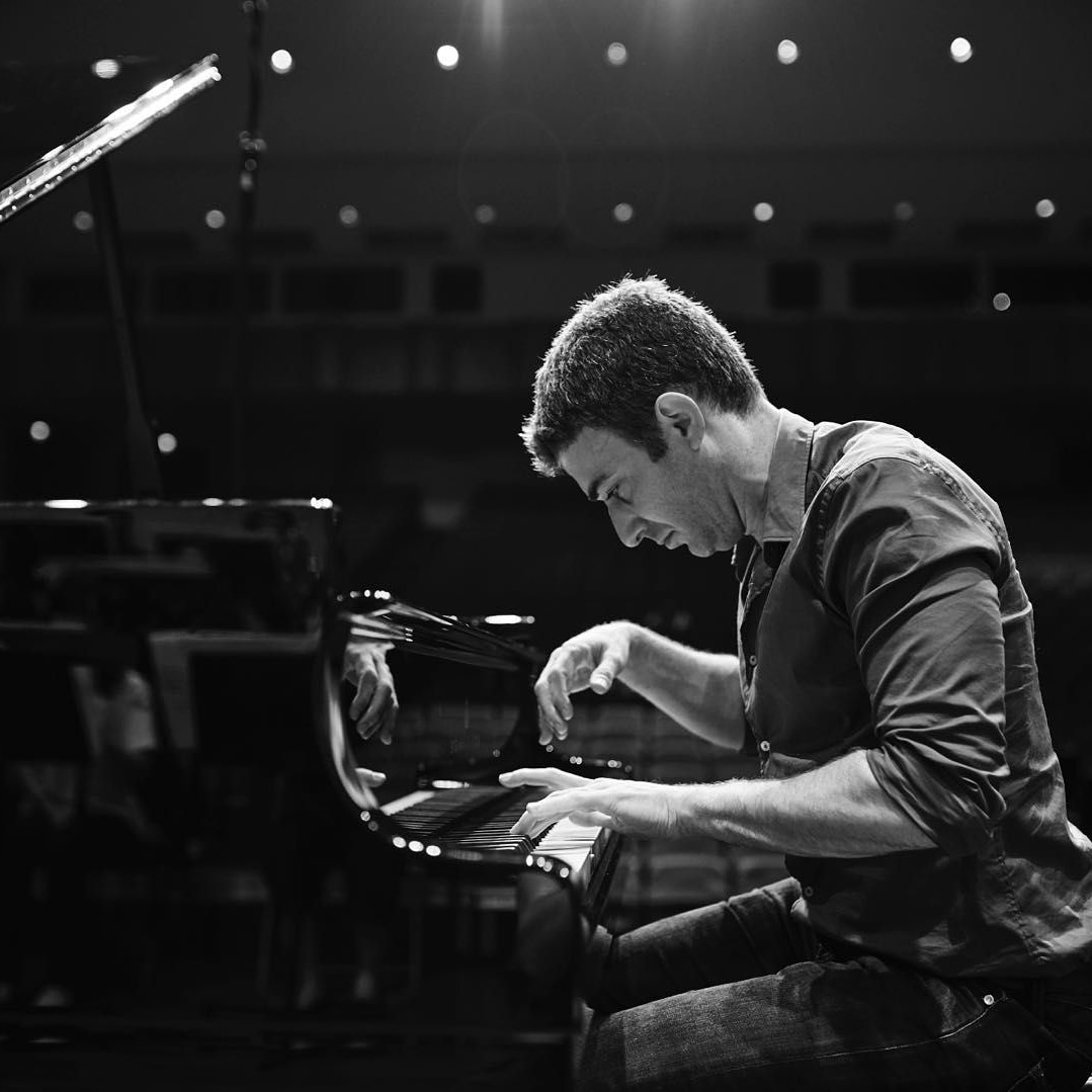 Yaron Kohlberg